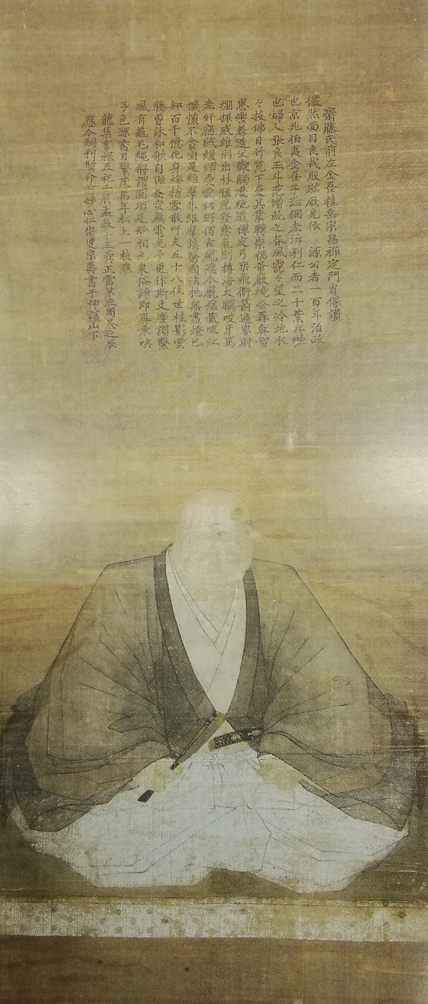 斎藤利安の肖像。